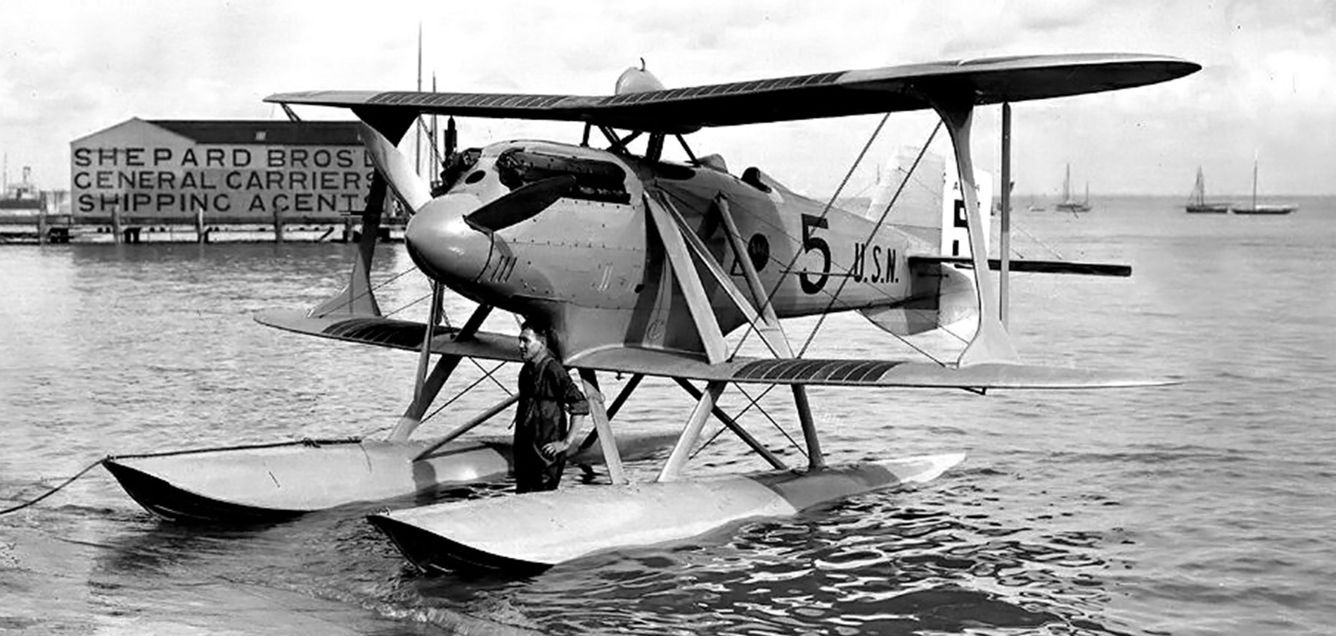 Le Navy Wright NW-2 avec son numéro 5 à l'île de Wight en préparation pour la course Schneider